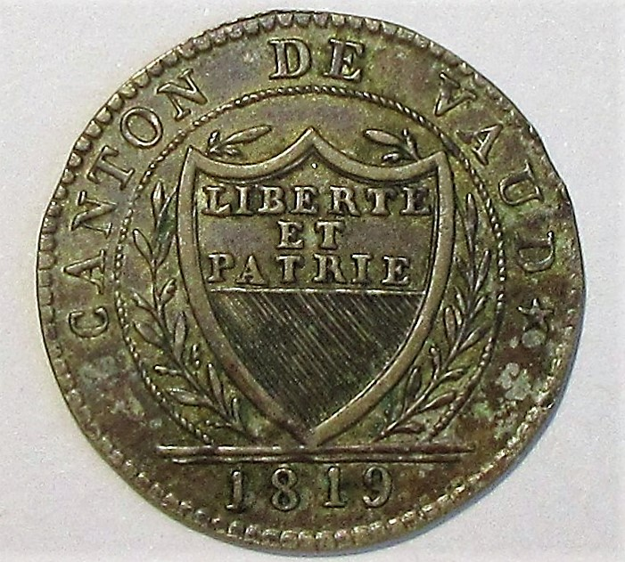 Wappenseite einer Batzenmünze für Waadt, Jahr 1819, Schön/Cartier Nr. 4